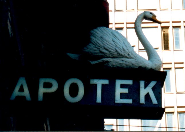 Svaneapoteket i Oslo)